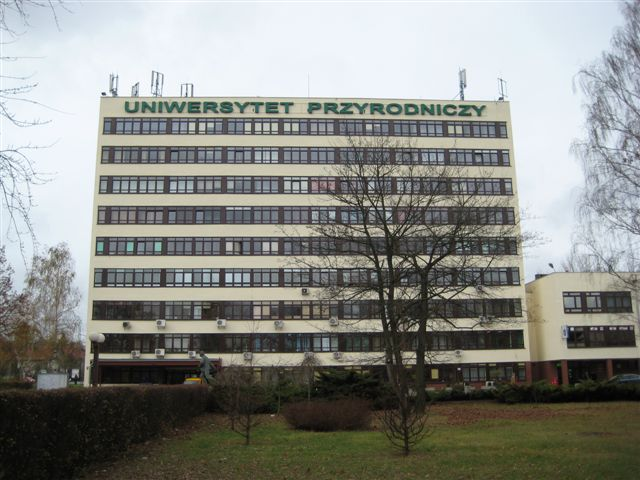 Collegium Maximum budynek główny Uniwersytetu Przyrodniczego w Poznaniu